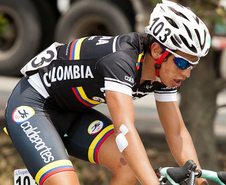 Ciclista colombiano del equipo Colombia-Coldeportes, en la 7ª etapa de la Vuelta a Colombia 2012